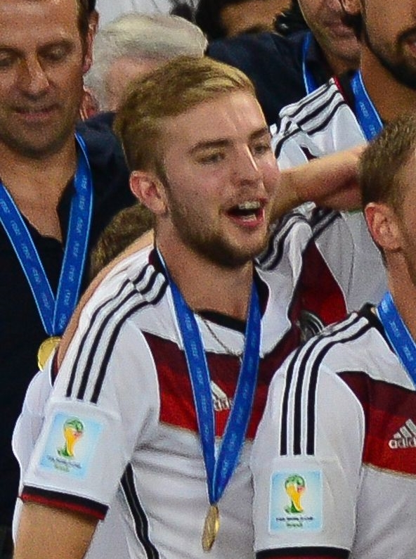 Christoph Kramer bei der Siegerehrung zum Weltmeister 2014